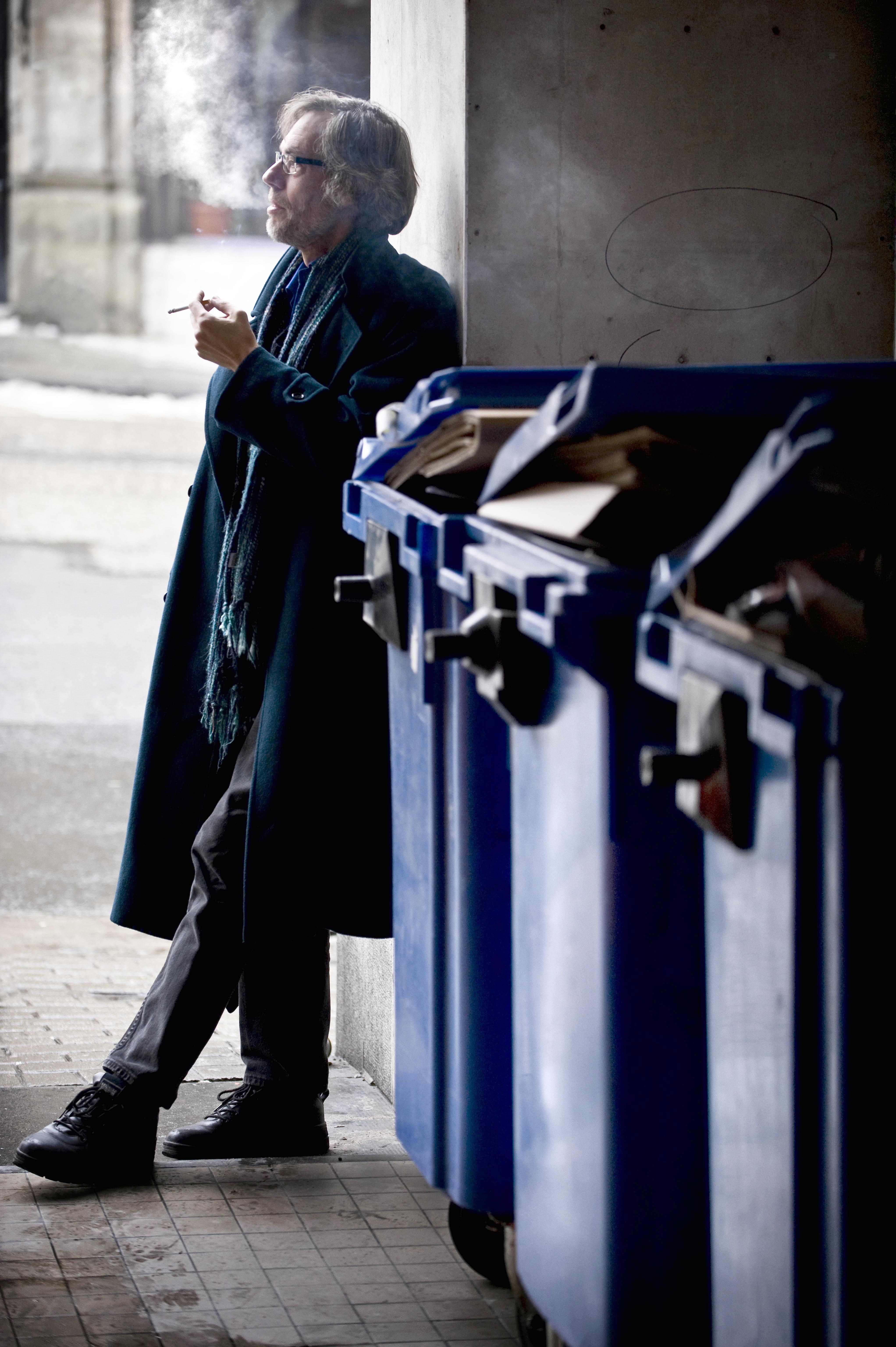 Marc Reynebeau, Belgisch journalist, historicus en dichter.